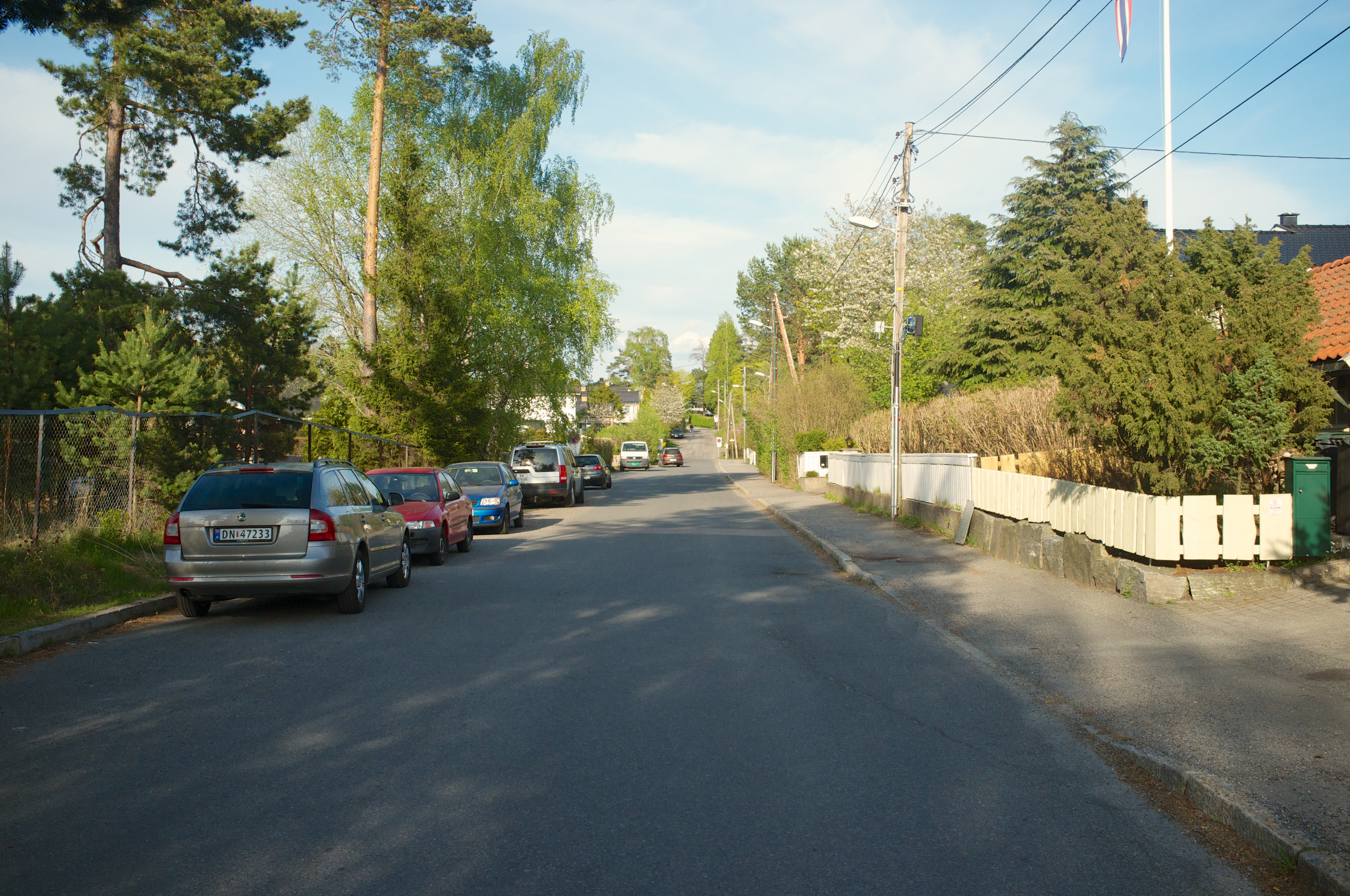 Lindbäckveien i Oslo.